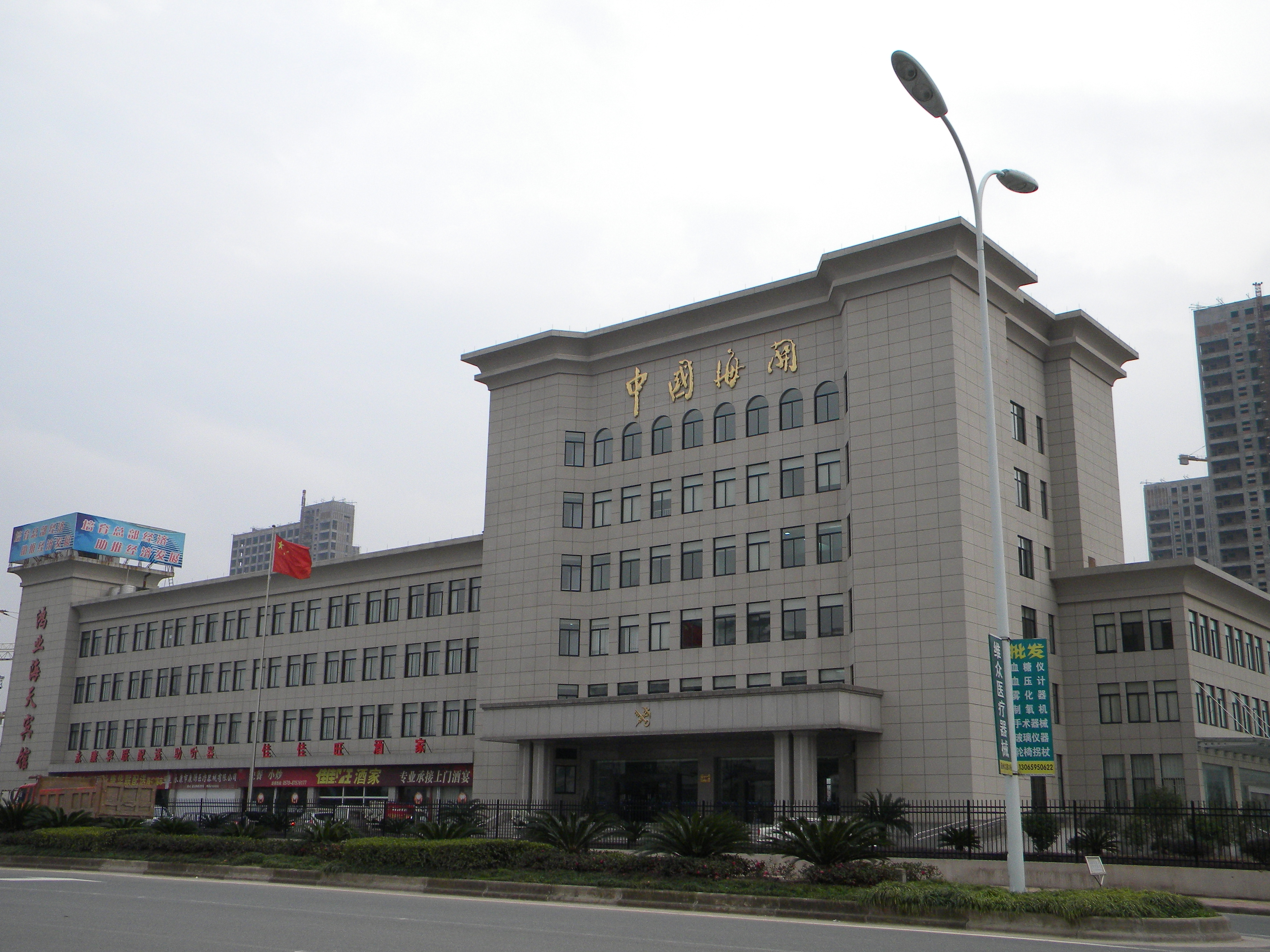 金华海关永康办事处